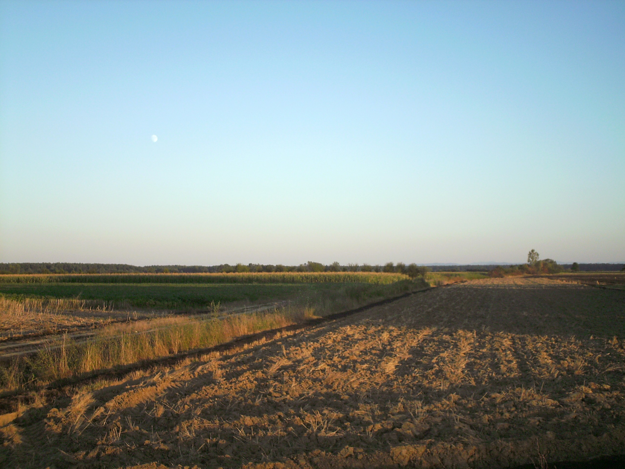 26.07.2007 _Vukovarsko-srijemska županija, Drenovci, Posavski Podgajci